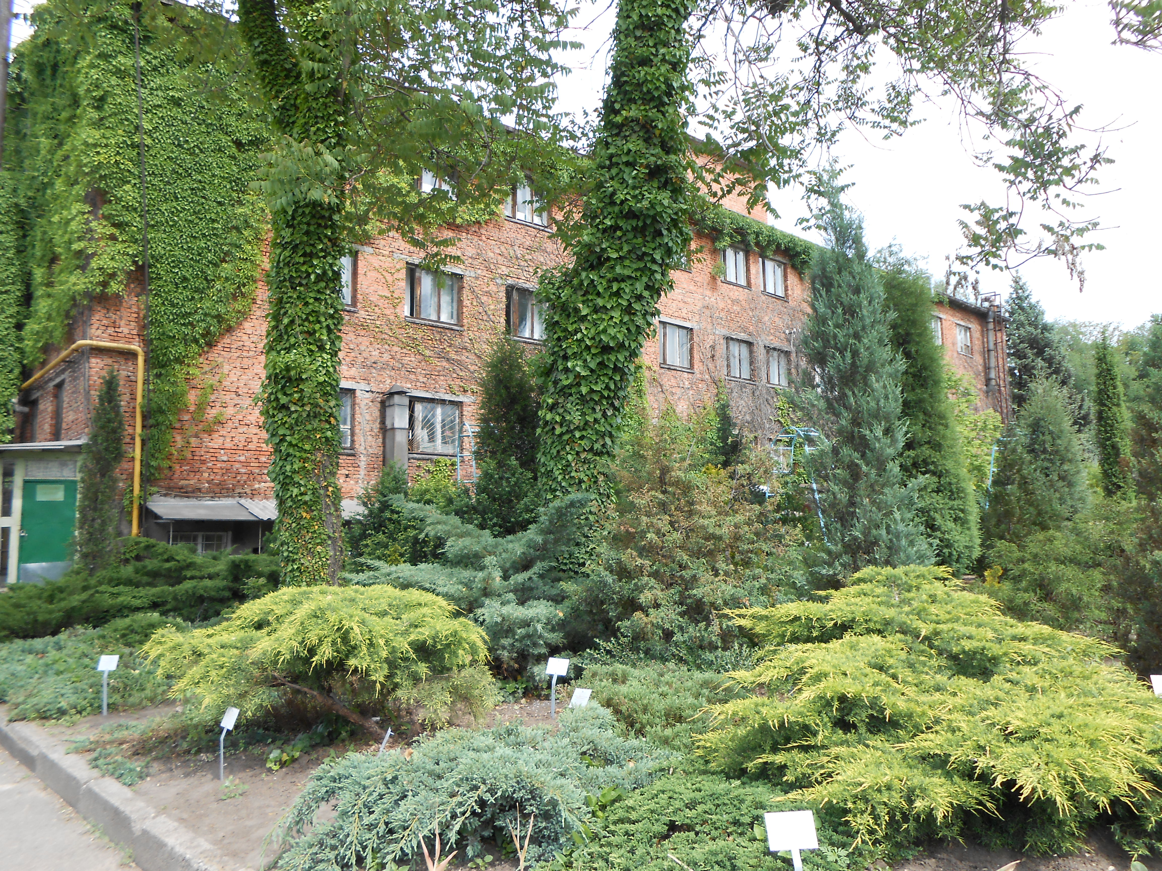 Ботанічний сад Дніпропетровськкого національного університету, м. Дніпропетровськ, пр. Гагаріна, 72